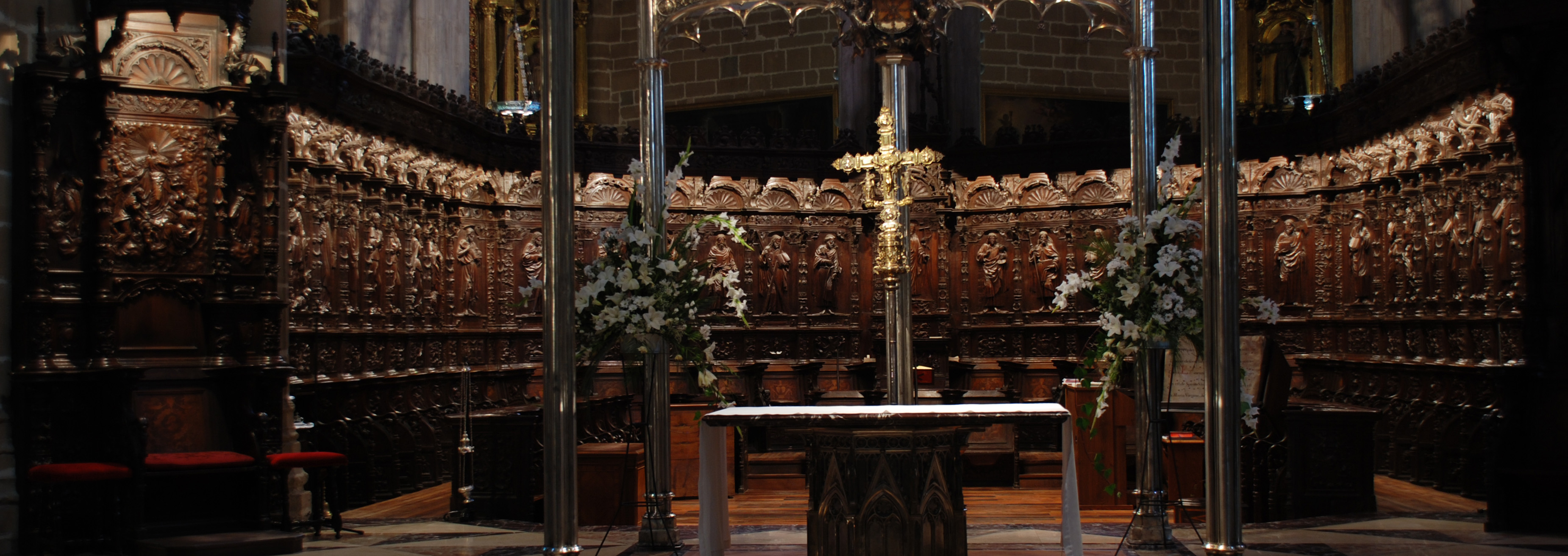 coro pamplona